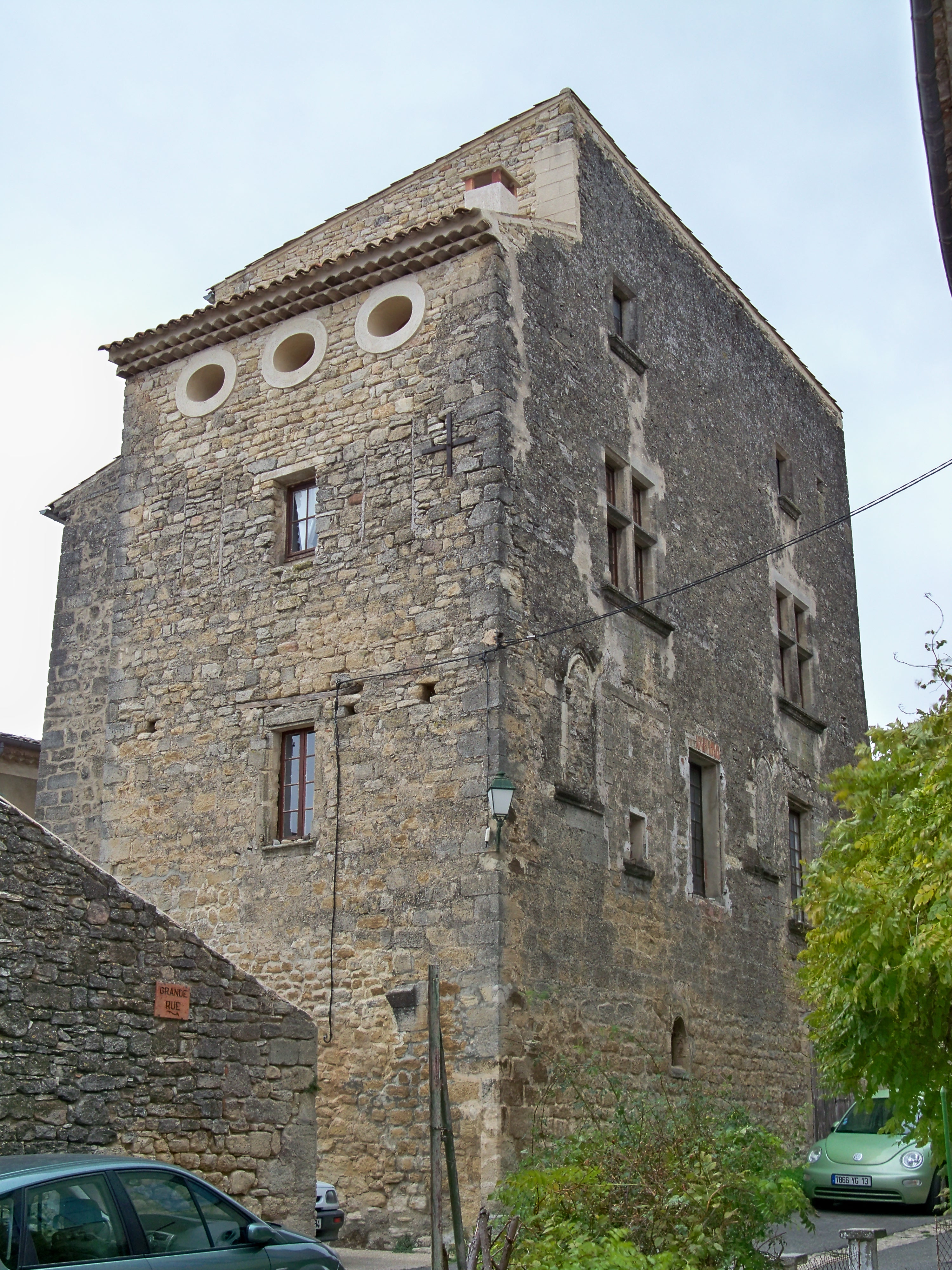 Maison à Viens, Vaucluse, France